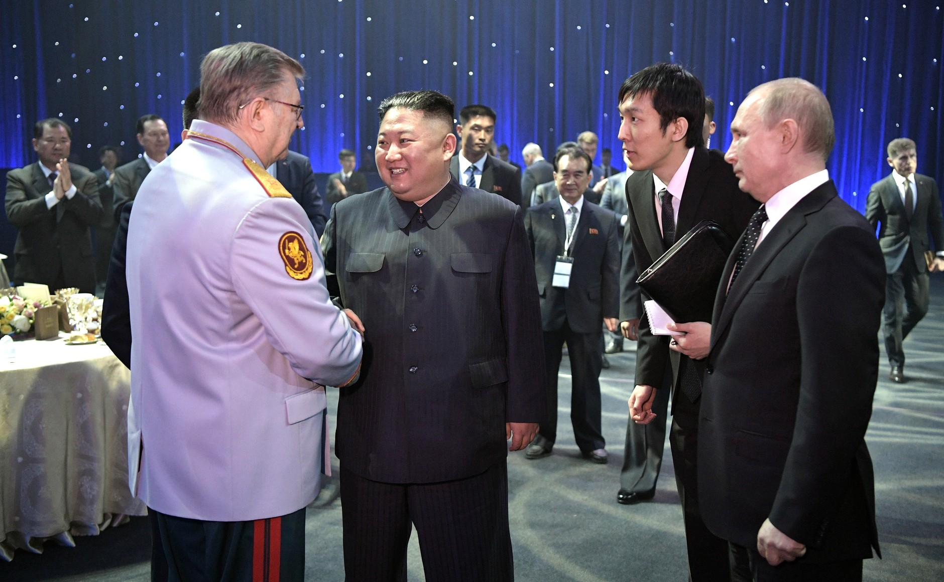 На официальном приёме от имени Президента Российской Федерации в честь Председателя Государственного совета КНДР Ким Чен Ына.